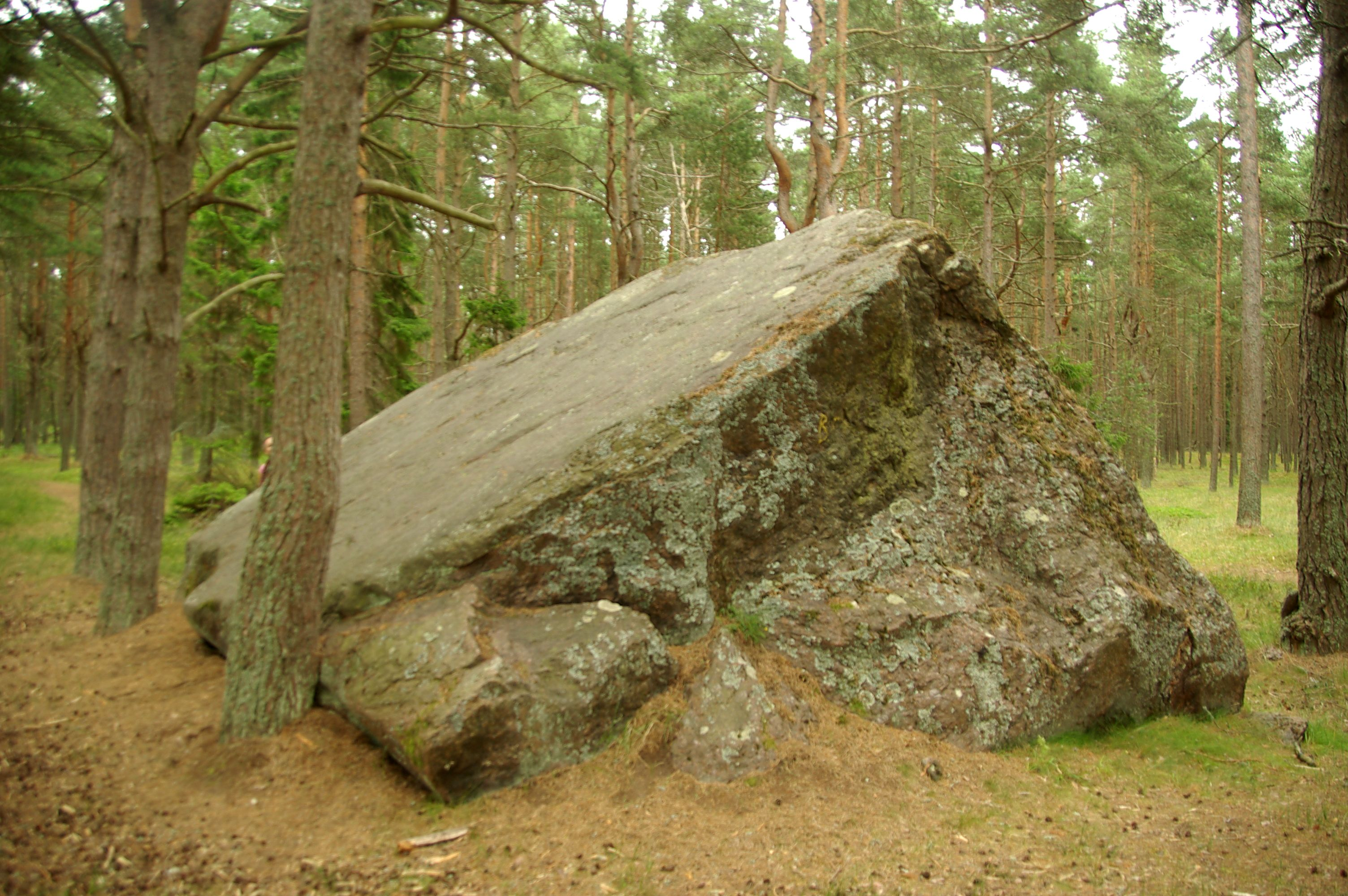 Eerikukivi ehk Maiekivi on looduskaitsealune kivi Aegna saarel,Harjumaal